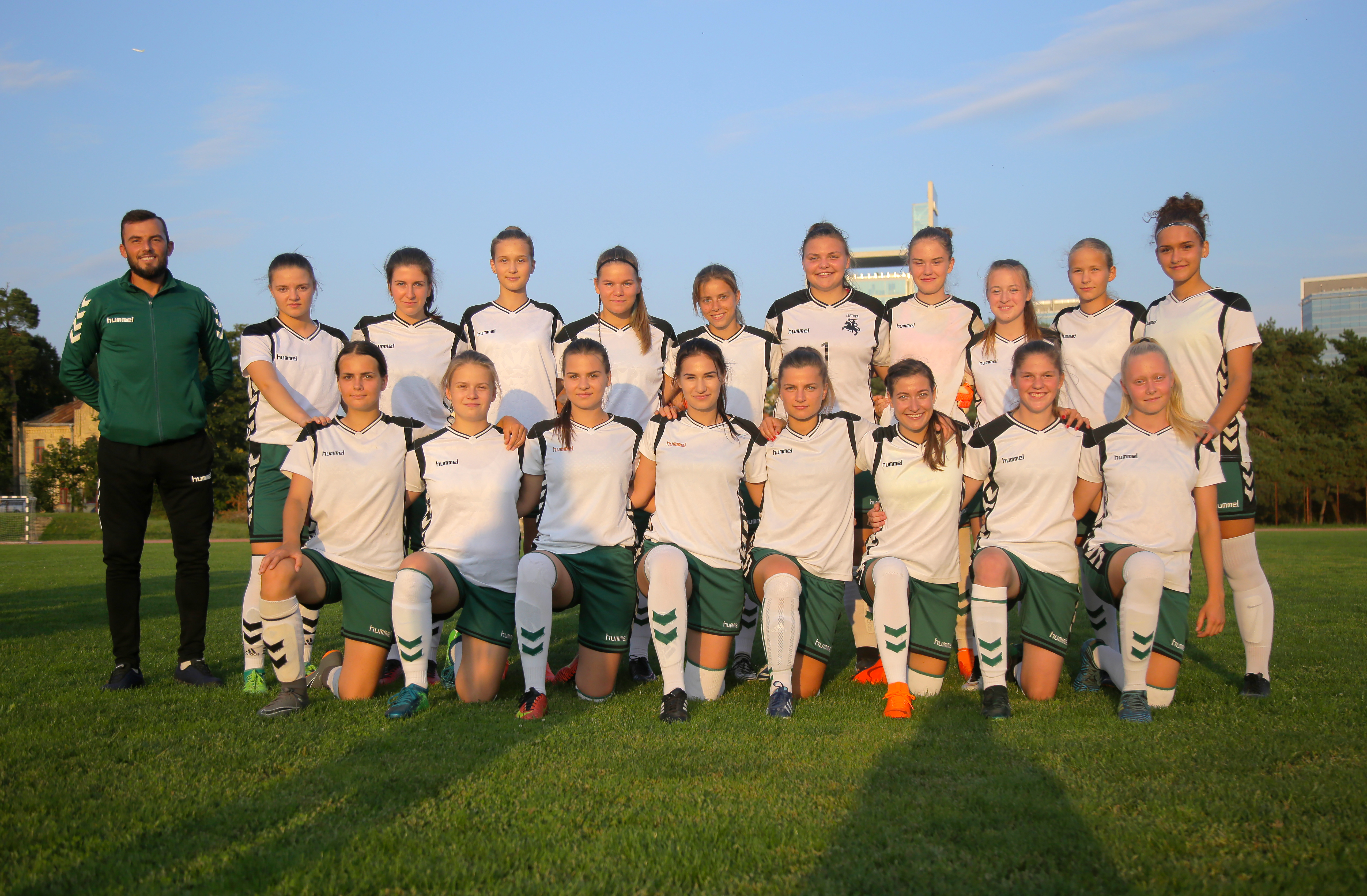 Komandinė nuotrauka prieš susitinkant su BC "Kažkur Matyti"